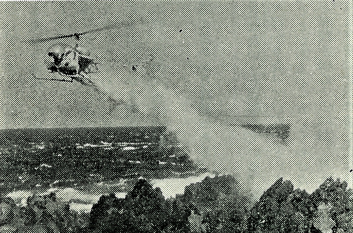 八丈小島鳥打地区のヘリコプターによるDDT空中散布（昭和31年8月9日）